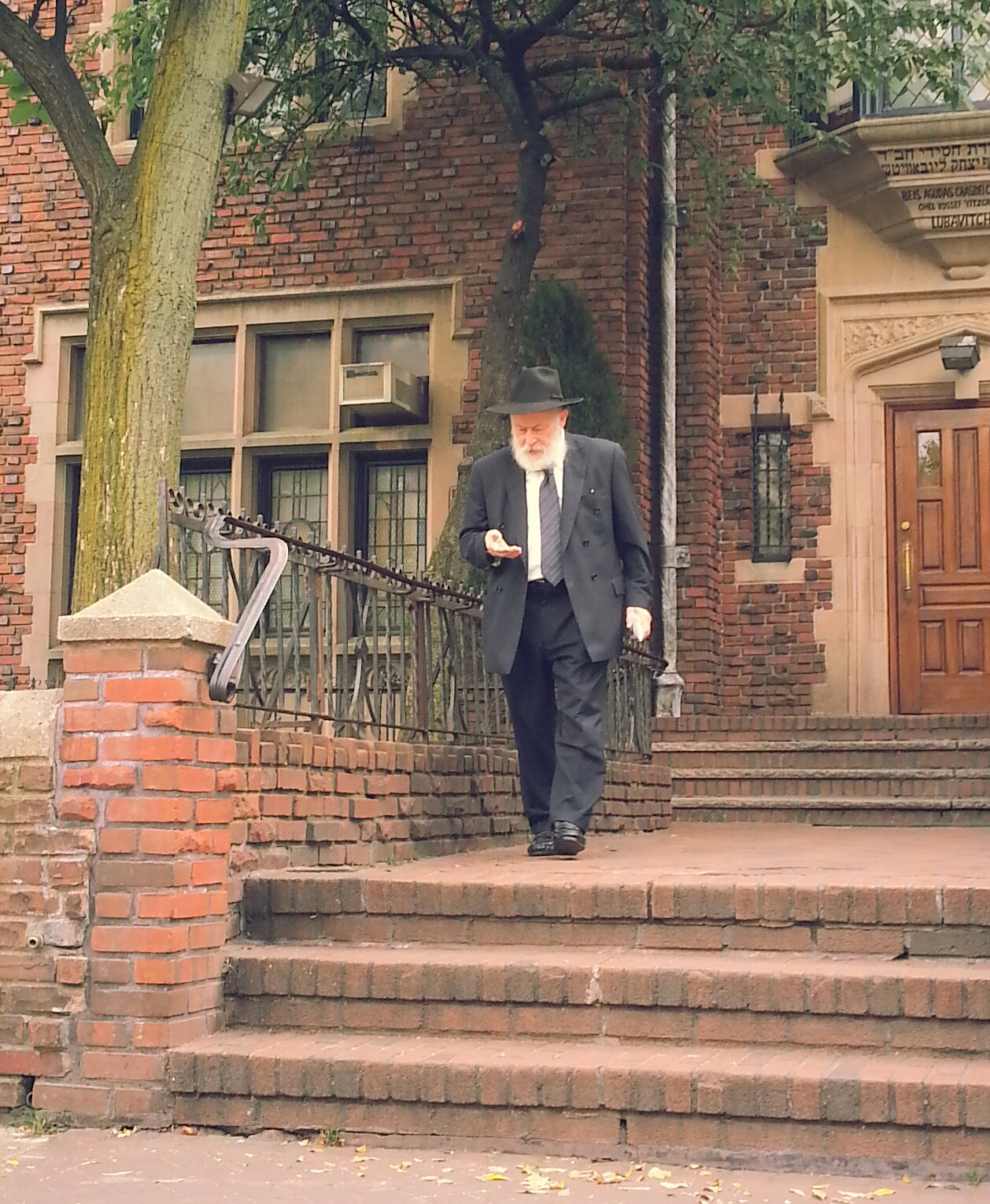 הרב יהודה קרינסקי מול 770